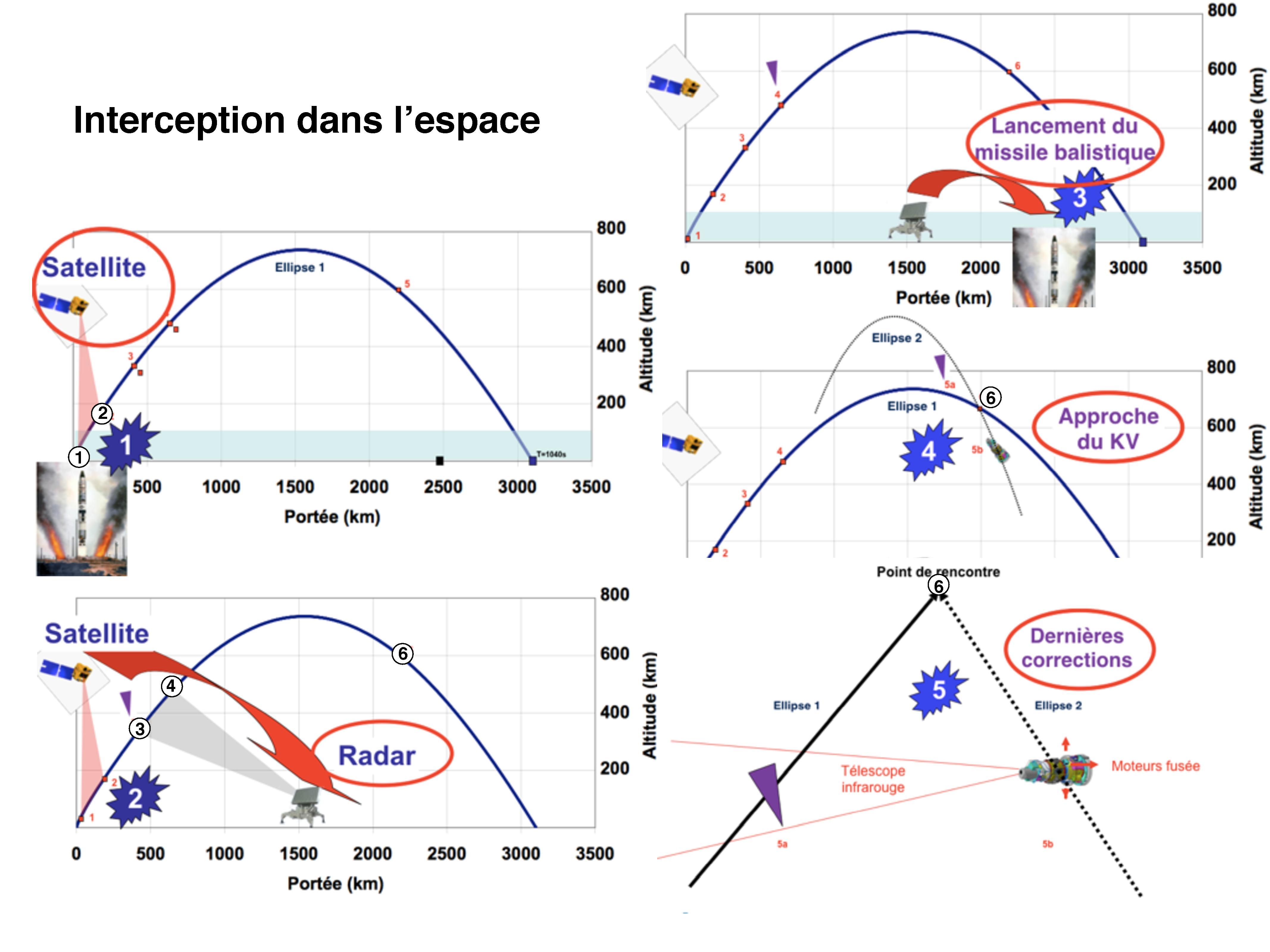 Interception dans l'espace